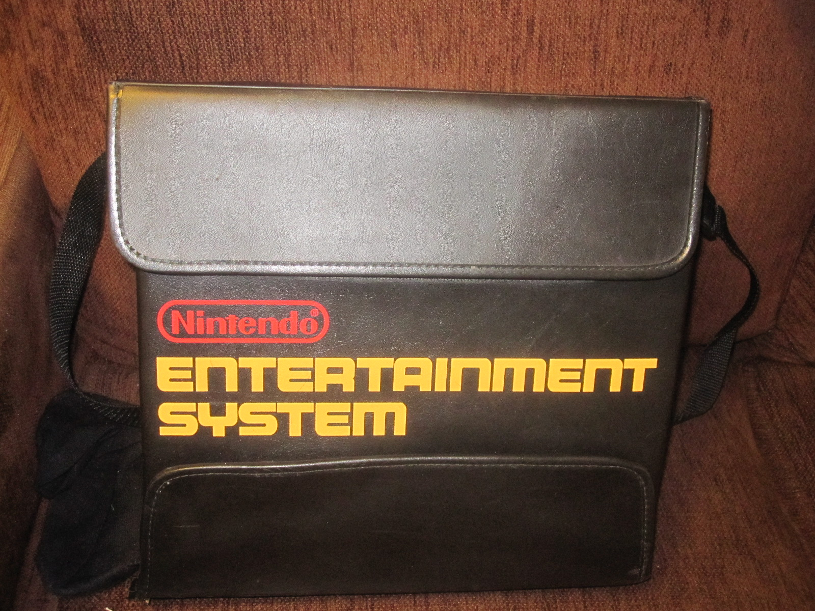 Nintendo Entertainment System -konsolille julkaistu nahkainen kantolaukku. Kantolaukku on ollut alkujaan pelikonsolia kotitalouksiin vuokranneiden yritysten käytössä.